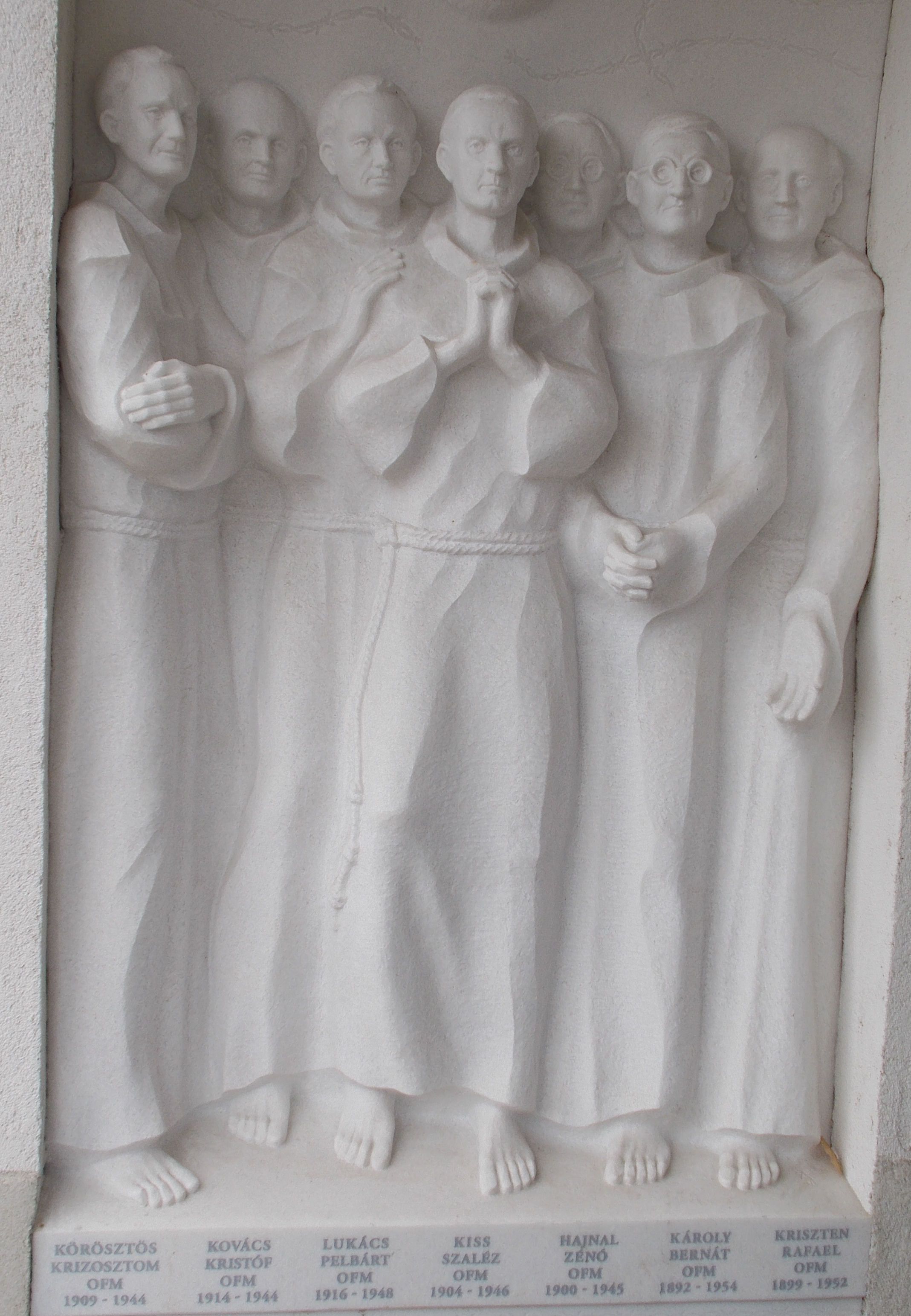 Dombormű a Kapisztrán Szent János Templom kapu bélésében. Hét ferences szerzetes: Körösztös Krizosztom (1900–1944), Kovács Kristóf (1914–1944), Hajnal Zénó (1900–1945), Kiss Szaléz (1904–1946), Lukács Pelbárt (1916–1948), Kriszten Rafael (1899–1952) és Károlyi Bernát (1892–1954). - Budapest II. kerület. Tövis utca 1/A Törökvész út sarok